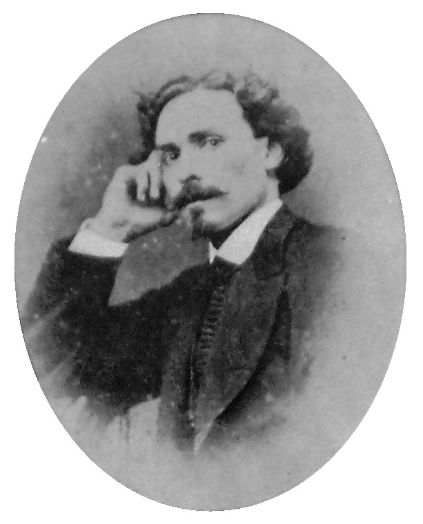 El pintor hispano-argentino José Bouchet (Pontevedra, España, 1848 - Argentina, 1919)